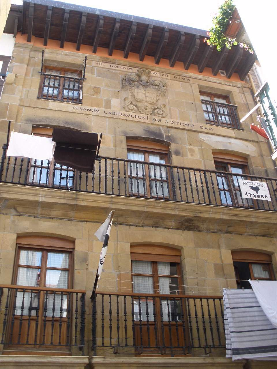 Palacio Indianokua (Getaria)